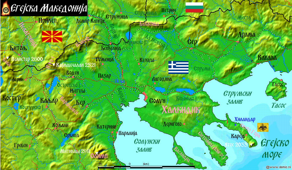 Географска карта Егејске Македоније,са већим градовима,саобраћајницама,језерима,рекама и врховима.